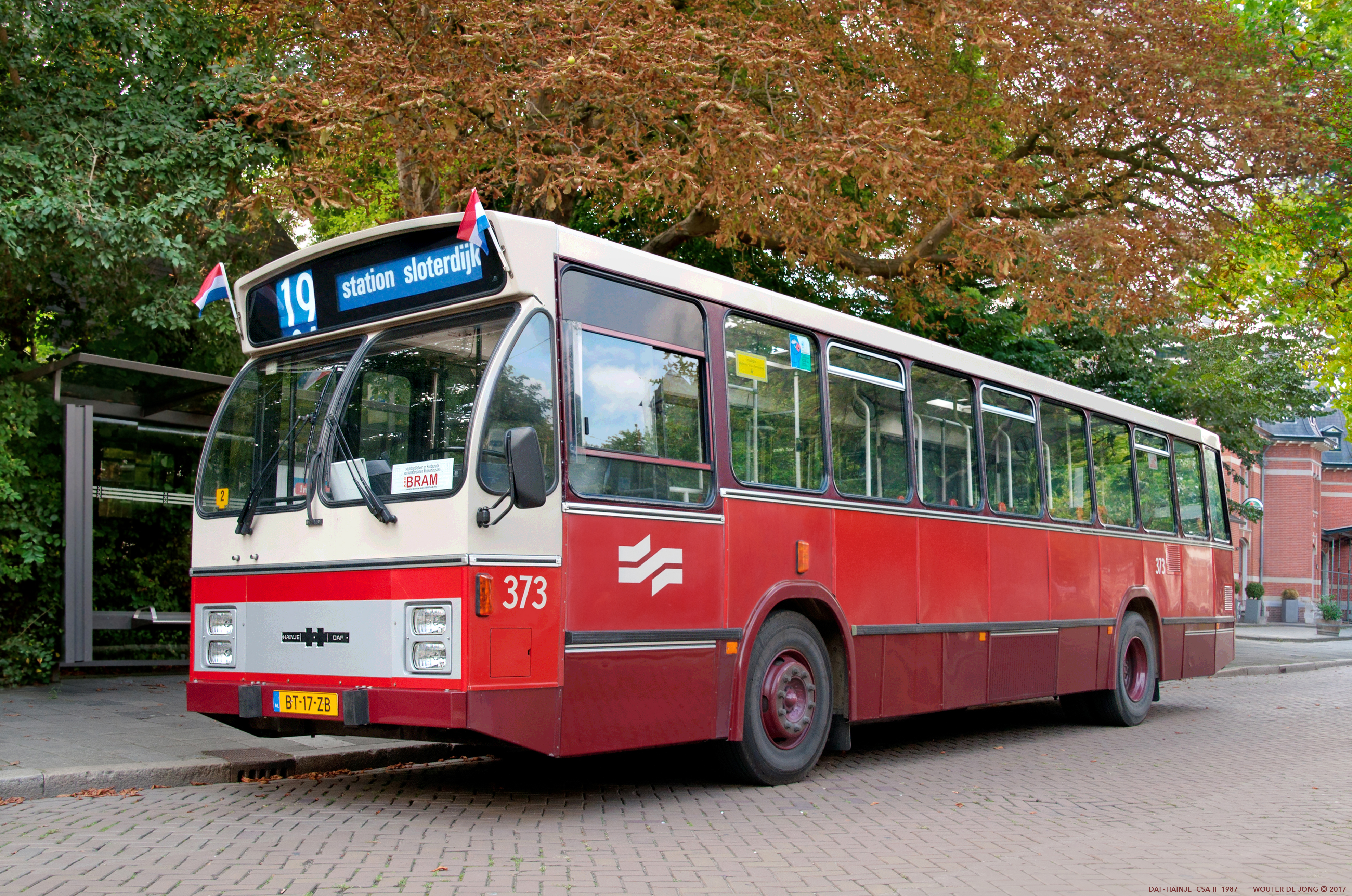 De DAF-HAINJE ex. GVB 373 was te zien tijden een open dag van de Stichting Electrische Museumtramlijn Amsterdam (EMA) aan de Havenstraat in Amsterdam 2017.